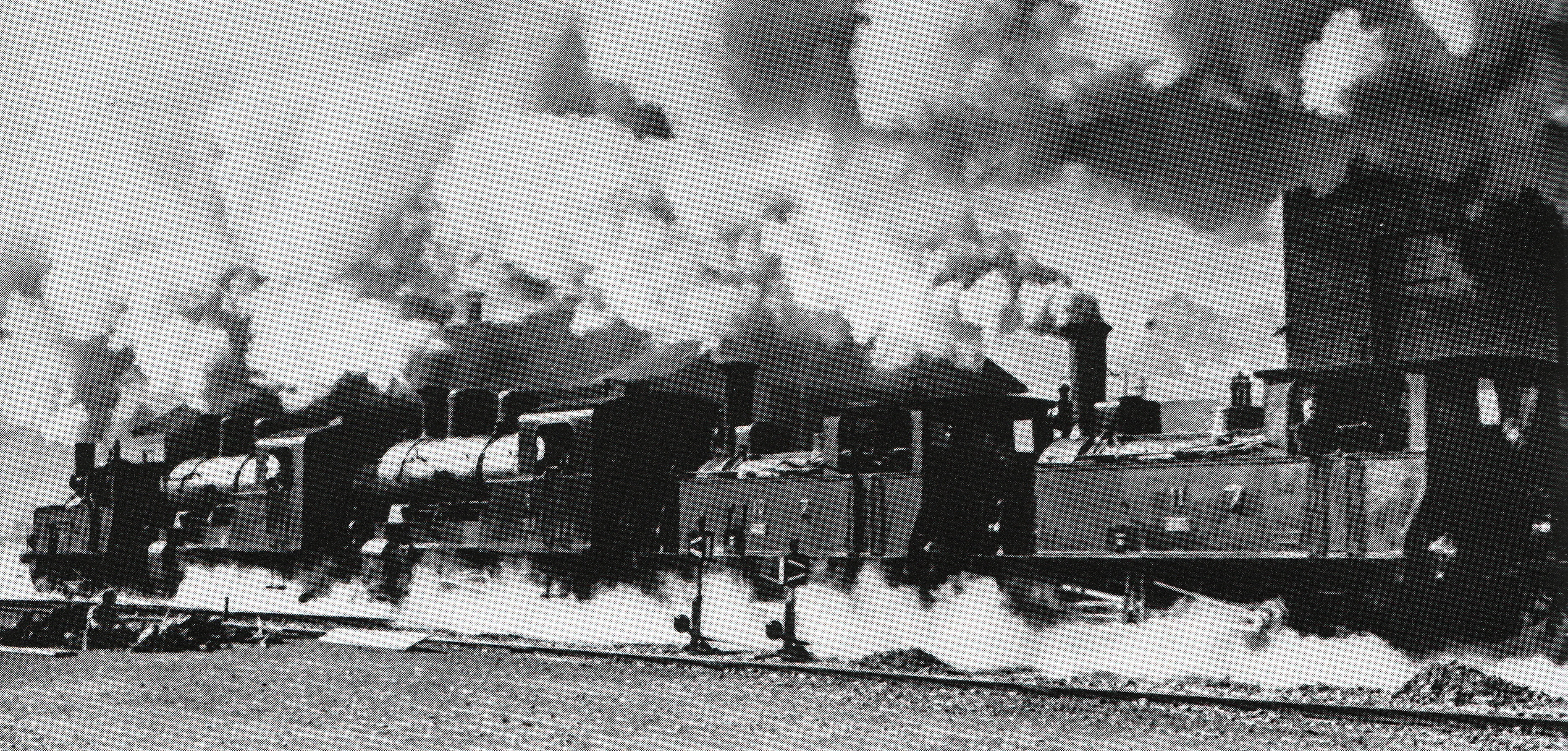 Fünf Dampflokomotiven der Südostbahn im Bahnhofe zu Samstagern, zuhinterst Nr. 10 und Nr. 11 des Typs E 3/3, gebaut 1891 in der Schweizerische Lokomotiv- und Maschinenfabrik zu Winterthur (Fabr.-Nr. 684/685), Nr. 10 1942 ans Messerschmidt’sche Flugmotorenwerk Ostmark am Griesfeld, Wiener Neudorf verkauft, 1945 an die BBÖ-Hauptwerckstätte Jedlersdorf, 1948 abgebrochen, Nr. 11 1954 außer Dienst gestellt und anschließend abgebrochen; davor beide Ed 4/5 (Betr.-Nr. 21/22), gebaut 1910 in der Schweizerische Lokomotiv- und Maschinenfabrik zu Winterthur (Fabr.-Nr. 2091/2092), 1940 als Nr. 9/10 an die Friedrich Krupp AG verkauft, 1949 als Nr. 98.112/113 an die Osthannoverſchen Eisenbahnen, 1963/61 außer Dienst gestellt und anschließend abgebrochen; zuvorderst eine weitere E 3/3.